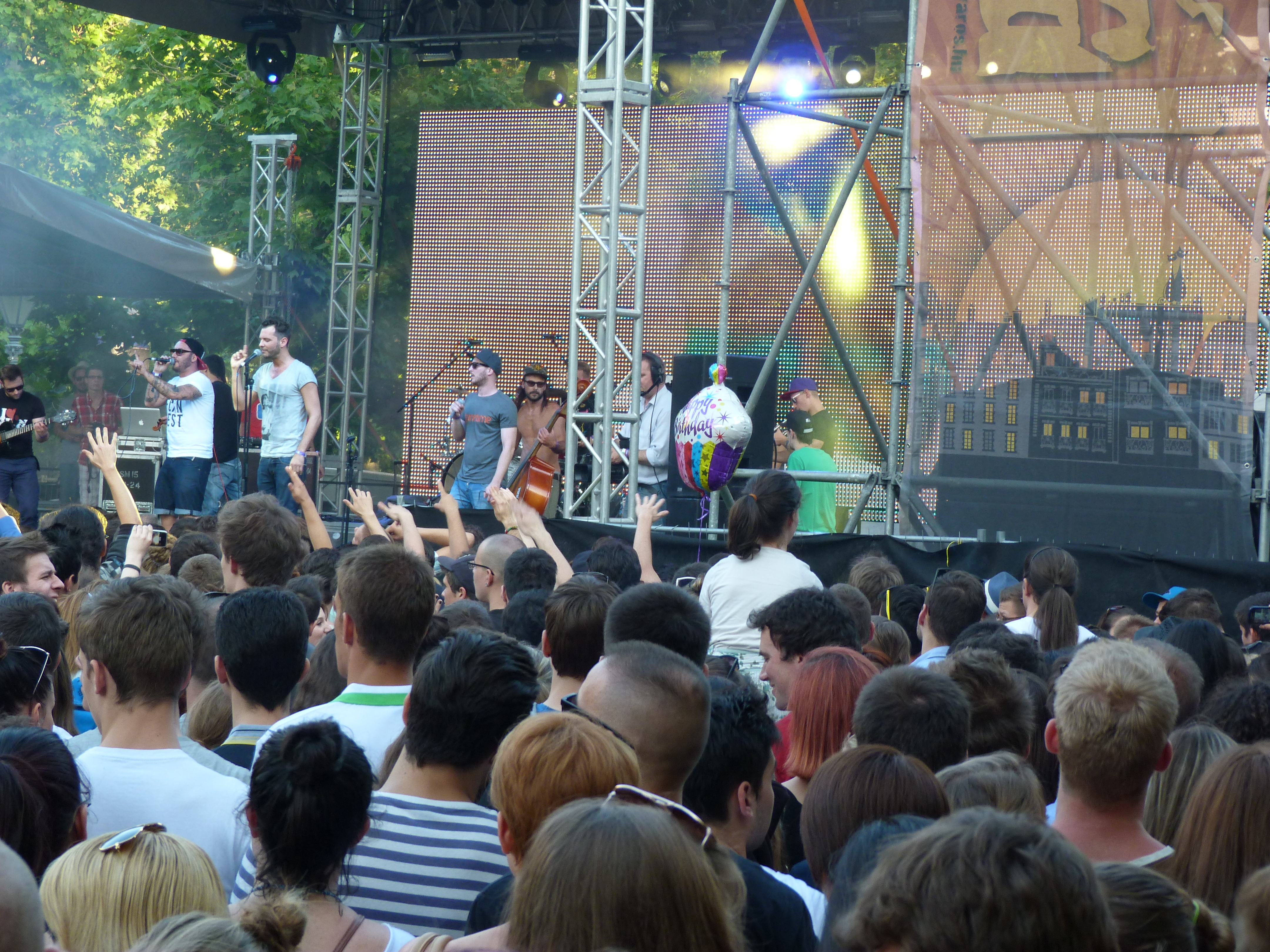 A felvétel 2013. Június 9 –én készült Budapesten, a Szabadság téren. Belvárosi Fesztivál. A Punnany Massif hip-hop zenekar. Négy lemezük jelent meg: 2006-ban a Körkorkép, 2010-ben a ShenKick, 2011-ben a SunKick, illetve 2013-ban a Fel#1. ©© Megjelent Creative Commons alatt a Metapolisz sorozatban. A Metapolisz sorozat valamennyi képe és filmje Creative Commons alatti valamint kereskedelmi - for profit - célra is felhasználható. Ajánlott hivatkozás: Derzsi Elekes Andor: Metapolisz DVD line ©© Published under Creative Commons in the Metapolisz DVD line. All of the photos and vids in the Metapolisz DVD line are under Creative Commons and can be used even for commercial – for profit – purposes. Recommended Citation Derzsi Elekes Andor: Metapolisz DVD line